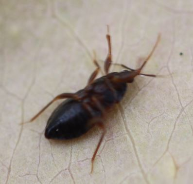 Wanze Lyctocoris dimidiatus am 23. November 2019 an einem gefällten Baumstamm in der Schwetzinger Hardt